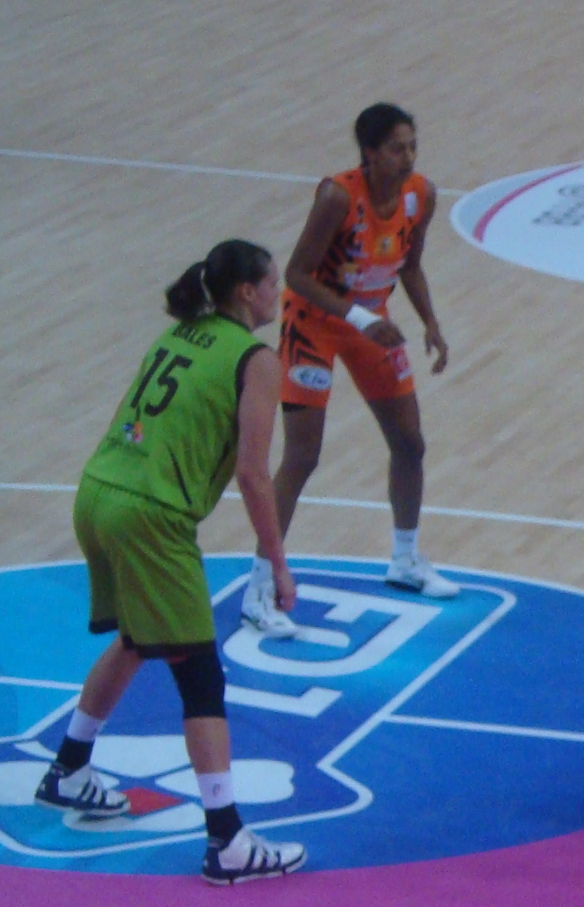 Les basketteuses française et américaine Emmeline Ndongue et Alison Bales